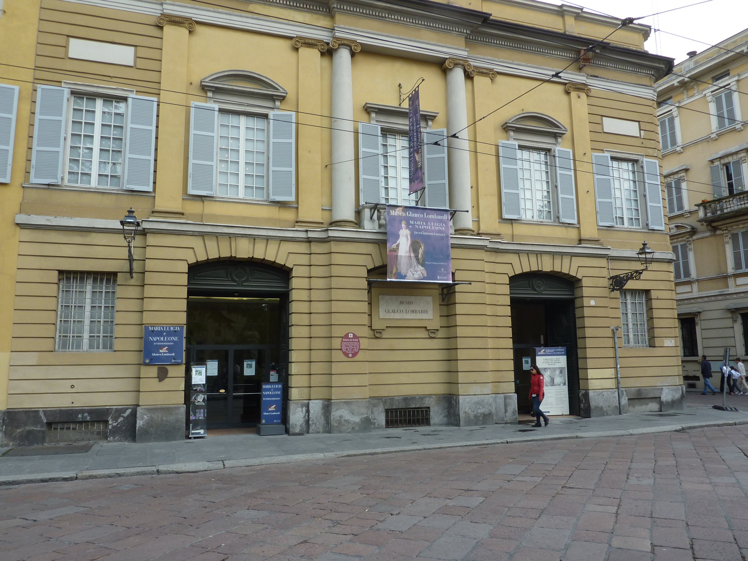 Il Palazzo di Riserva a Parma, lato di via Garibaldi che ospita il Museo Lombardi.